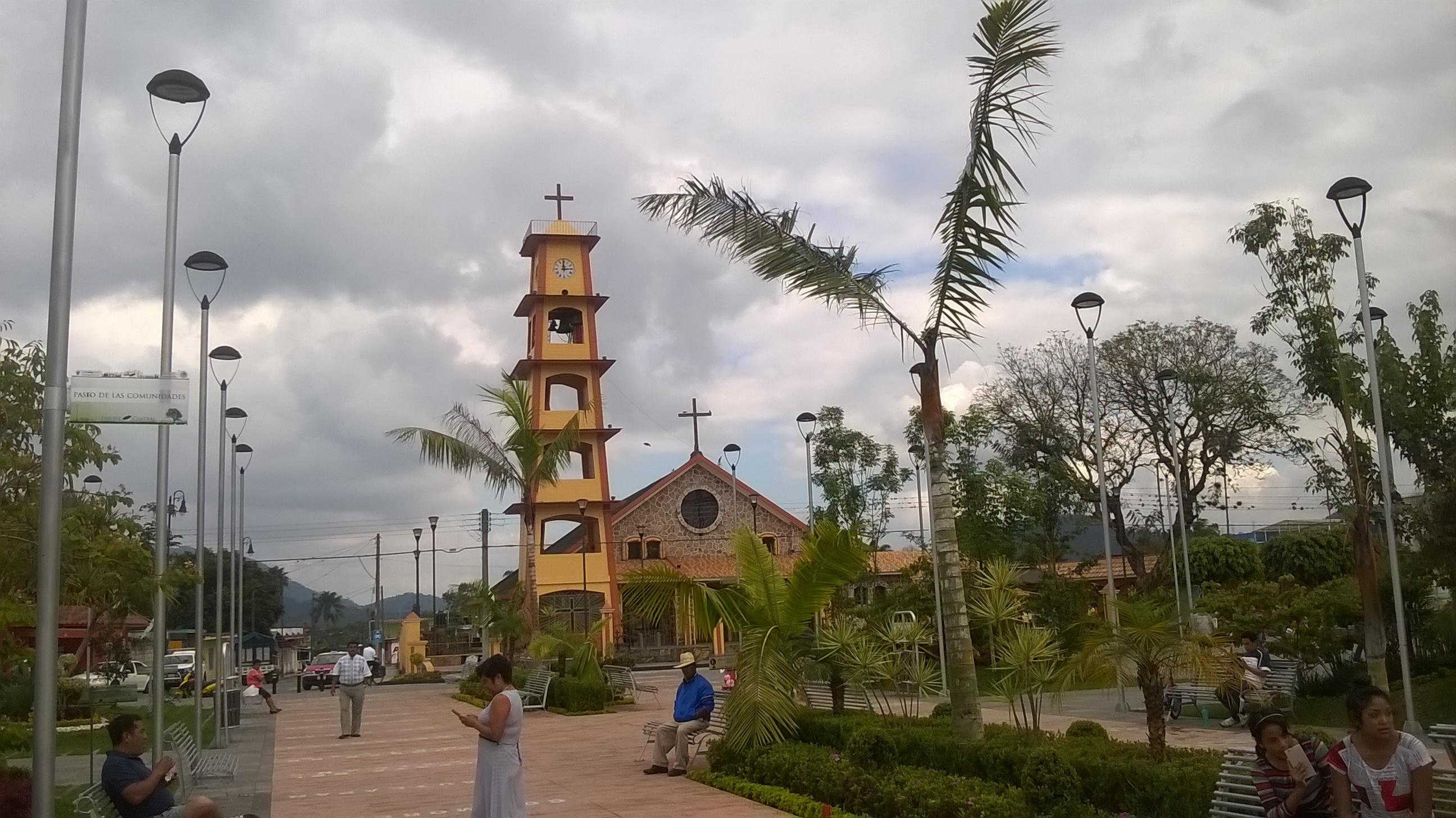 Parque en Ixtac, Veracruz